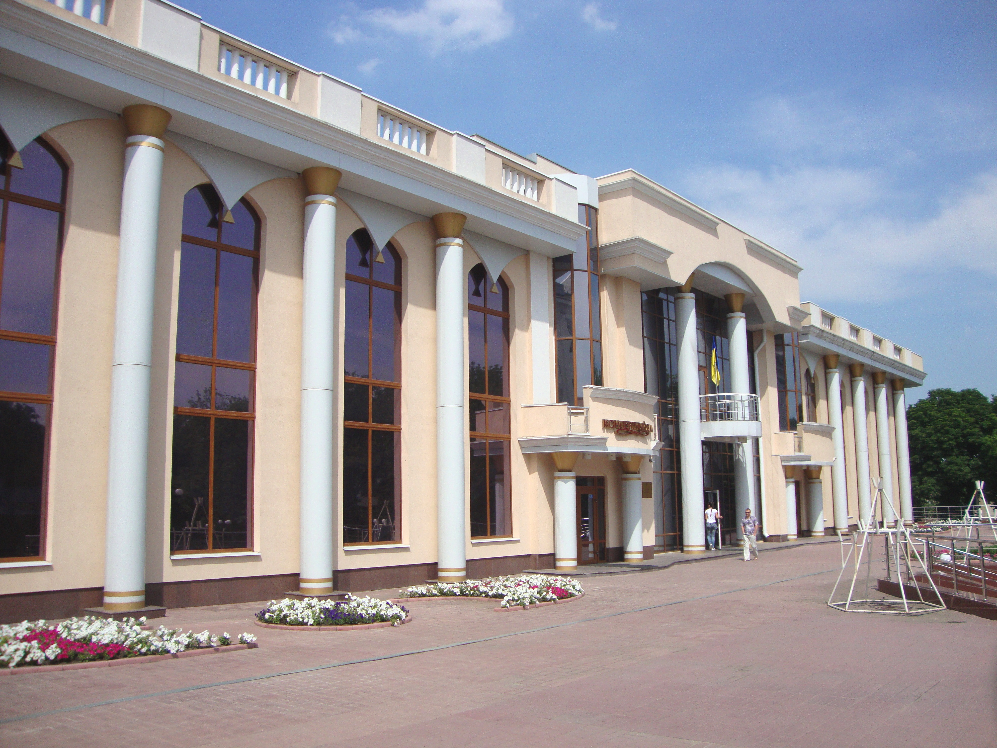 Луганська обласна філармонія Unknown